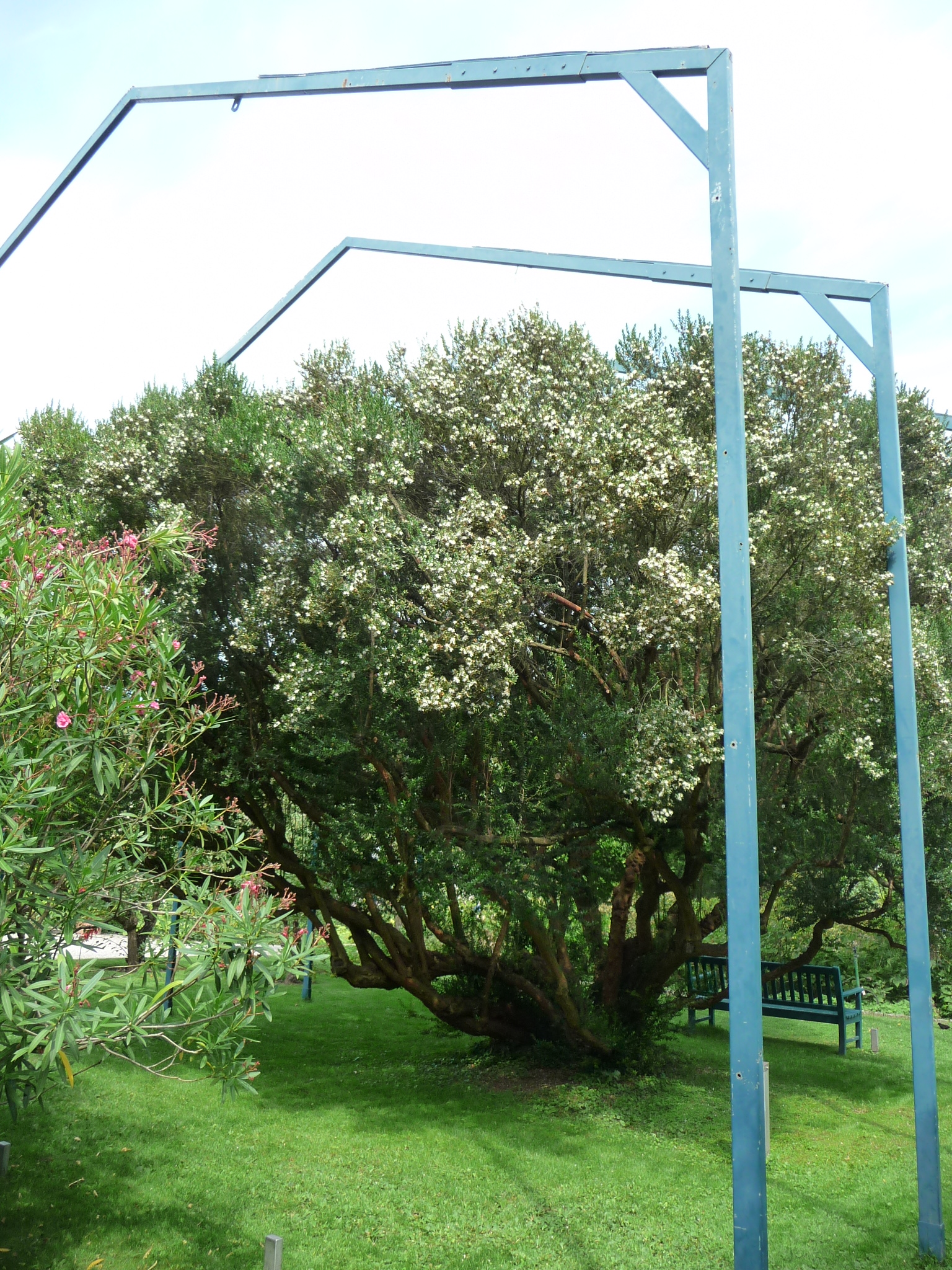 historische Myrte im Hermannshof Weinheim